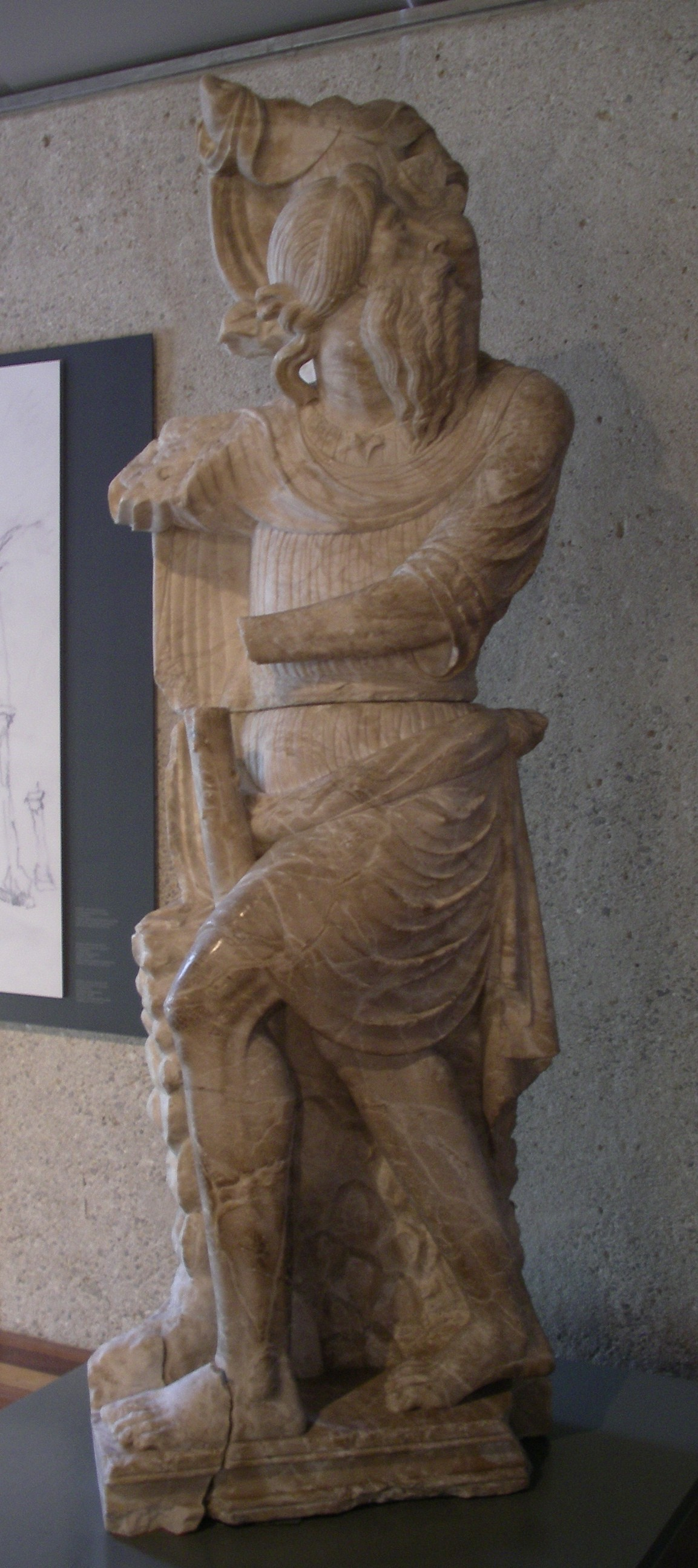 Sant Cristòfol, escultura de marbre de Gil de Medina, del s. XVI, que era a l'Església de Sant Miquel de Barcelona. Avui al Museu Diocesà de Barcelona